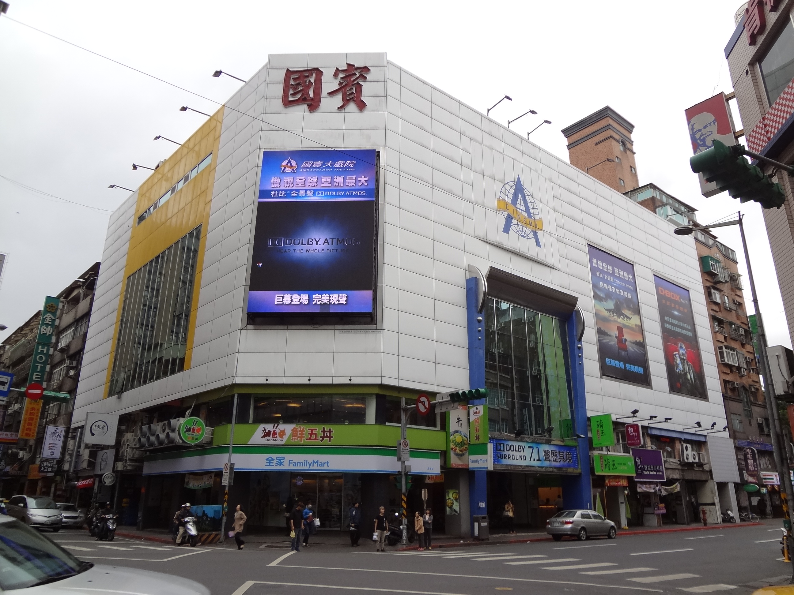 中文（台灣）: 國賓大戲院，位於臺灣臺北市萬華區成都路88號。